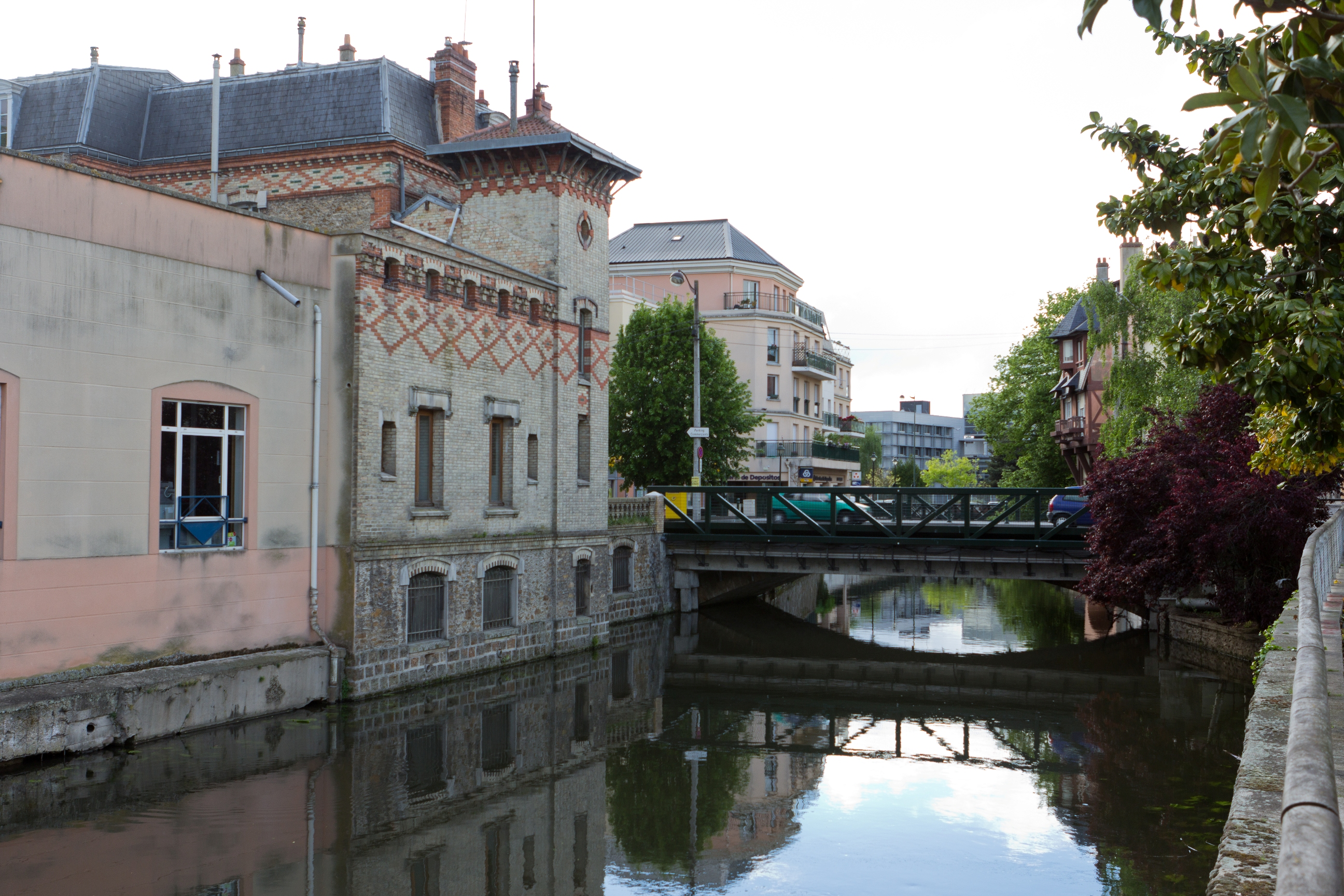 La rivière Essonne dans le centre de Corbeil-Essonnes (Corbeil-Essonnes / Essonne / France)